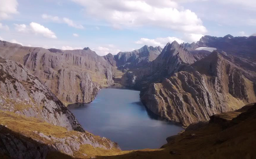 Laguna Ventanilla en la puna de Tallán a 4300 msnm - Chacas, Ancash, Perú